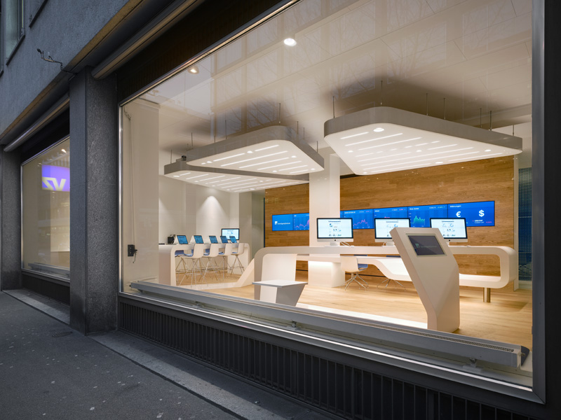 Kundenlounge am Hauptsitz der VZ Holding in Zürich